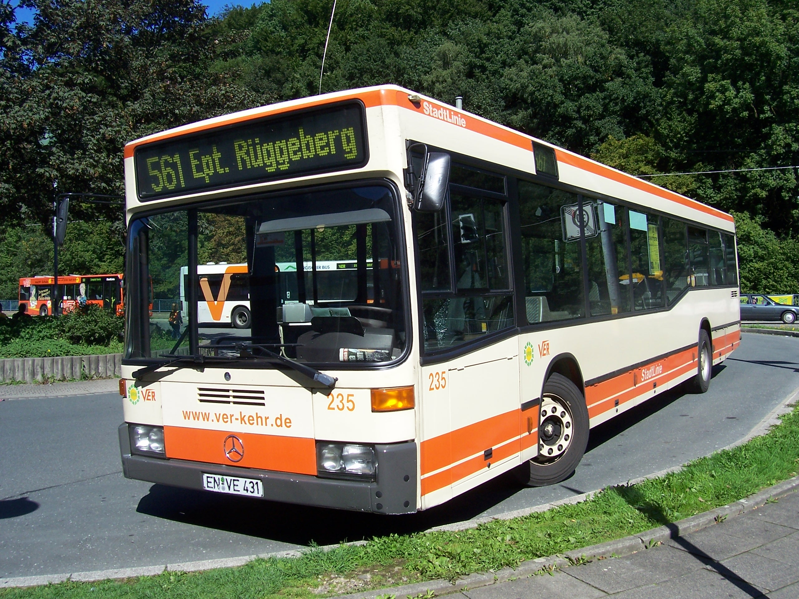 Ein Mercedes-Benz O 405 N Stadtbus der Verkehrsgesellschaft Ennepe-Ruhr (VER) an der Haltestelle Ennepetal Busbahnhof